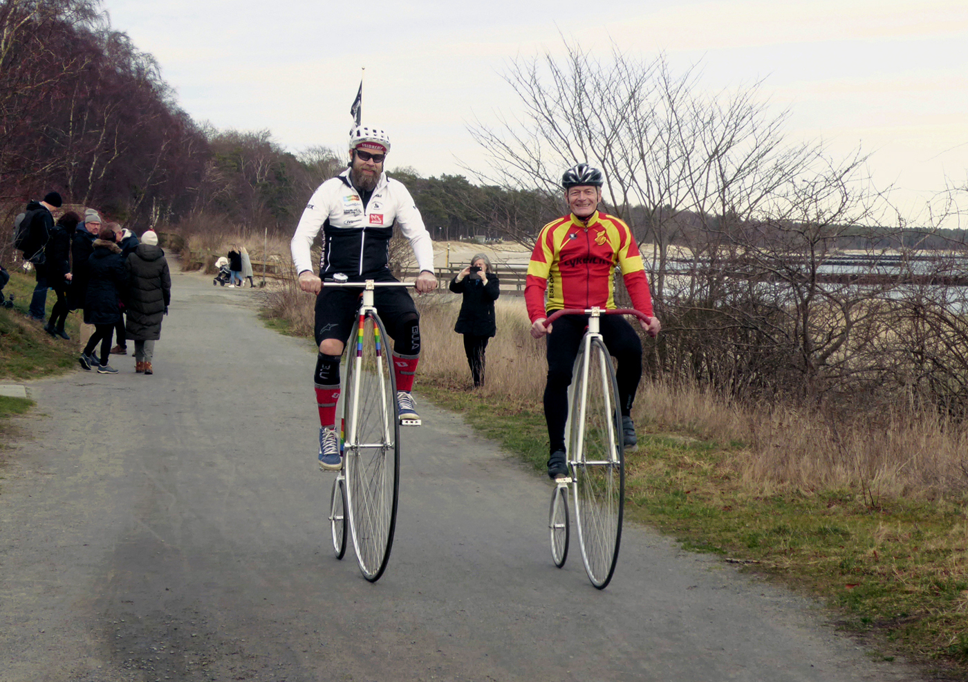 Två höghjuls cyklister vid en pressträff i Ystad 5 feb 2020 inför ”Sweden 3 Days Highwheel Race""